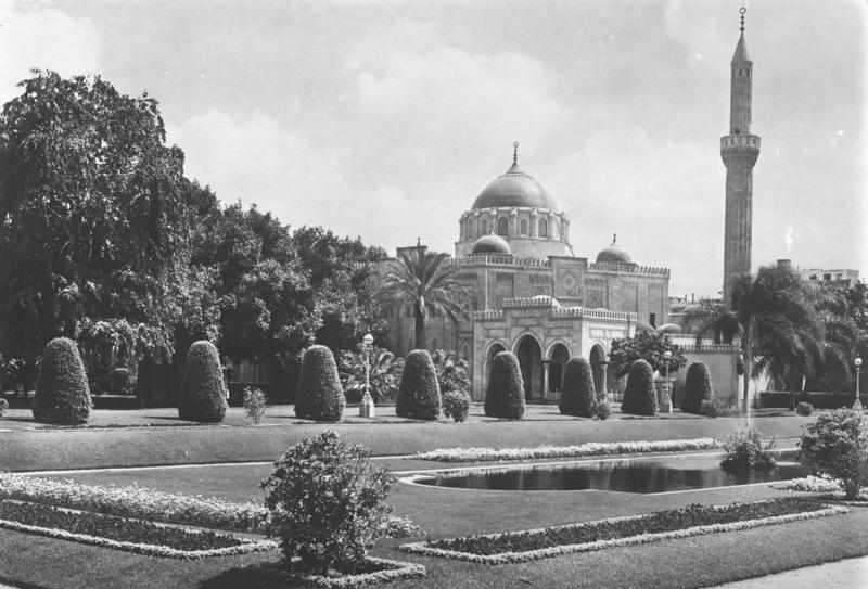 Wo lebt und wirkt der König von Aegypten! Ein interessanter Einblick in die königlichen Schlösser und Gärten, in welchen König Fuad von Aegypten lebt. Die Jardien-Moschee im Palais d´Abdine in Kairo, die Betmoschee König Fuads, eine der schönsten Moscheen der Welt.